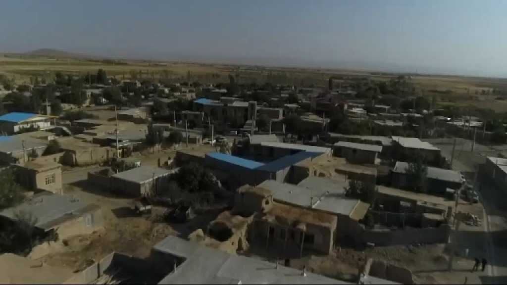 تصویری هوایی از روستای پاینده در مهرماه 1396 شمسی